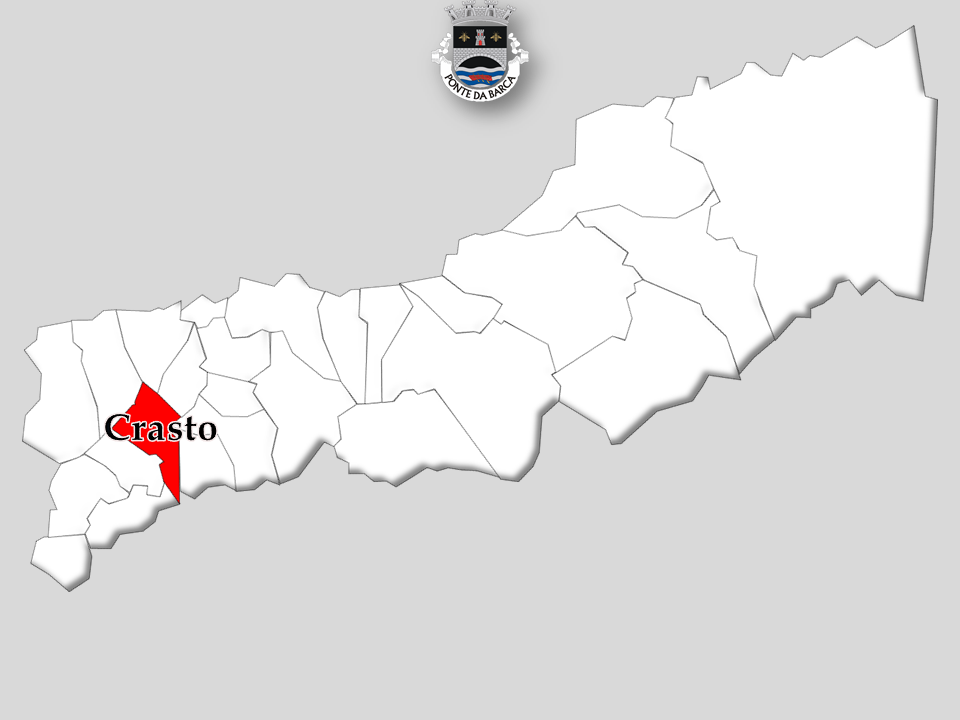 Censos 1864/2011